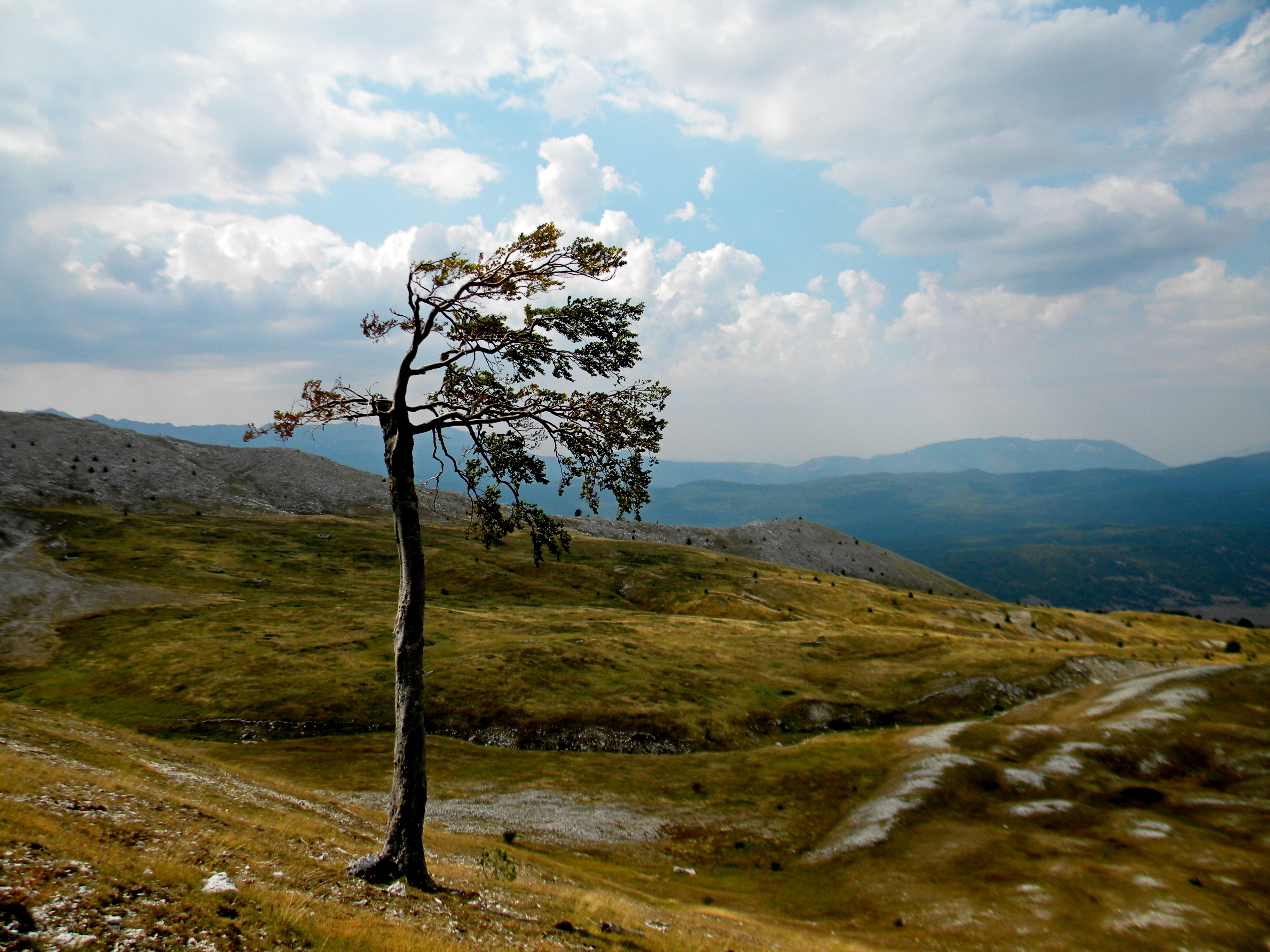 Заштићени природни предио Црвањско, Улошко језеро са околином, Калиновик ID добра: PZPP004 Детаљ са планине Црвањ код Невесиња